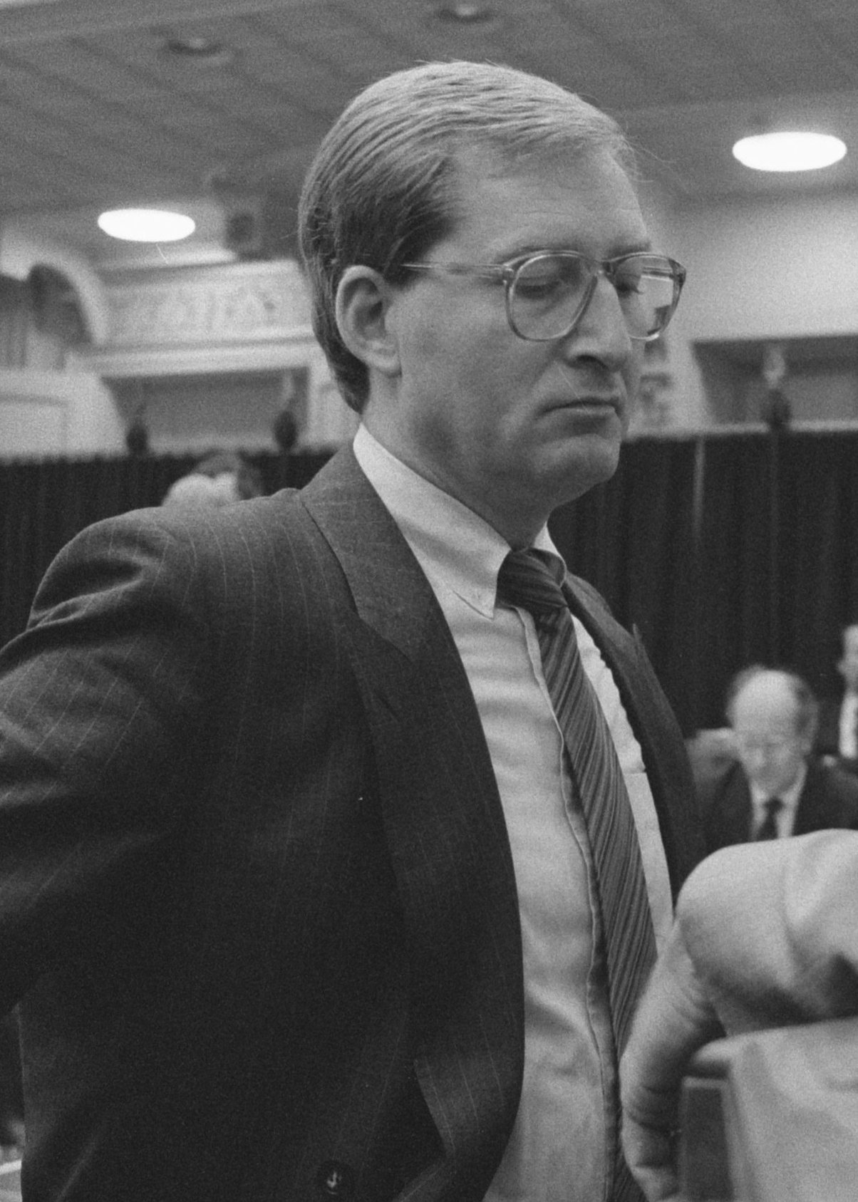 Tweede Kamer , debat over rapport parlementaire enquetecommissie paspoortproject